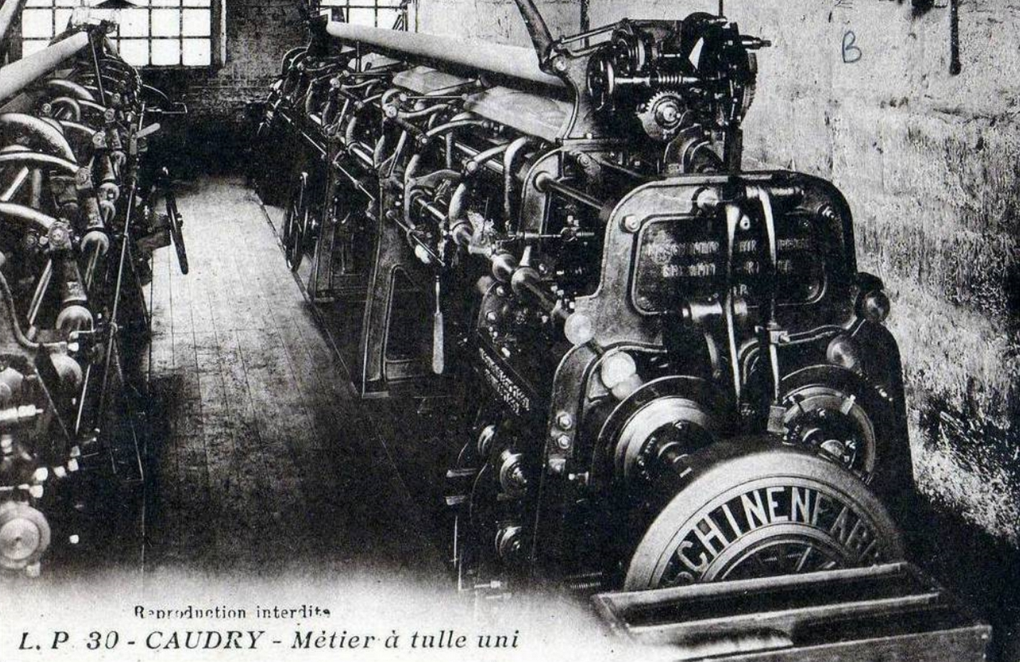 Métier à tulle uni de la Maschinenfabrik Kappel AG (Chemnitz) à Caudry, Nord, Nord-Pas-de-Calais (Hauts-de-France depuis 2016), France.